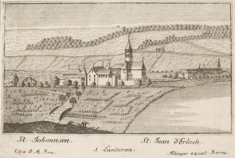 SNB, GUGE-NÖTHIGER-F-38